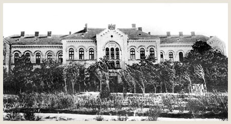 Srpski (latinica): Zgrada Internog odeljenje Centralne vojne bolnice na Vračaru, Beograd, Srbija